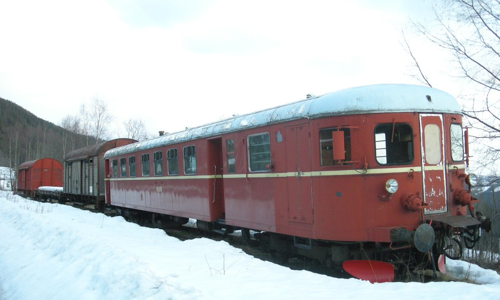 Gamle jernbanevogner på utstilling på Bjørgo stasjon